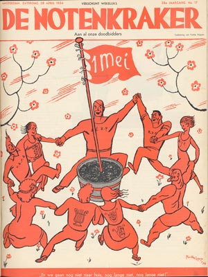 Tijdschrift De Notenkraker. Jrg. 28, no. 17 (28 april 1934). Aan al onze doodbidders. "En we gaan nog niet naar huis, nog lange niet, nog lange niet!".